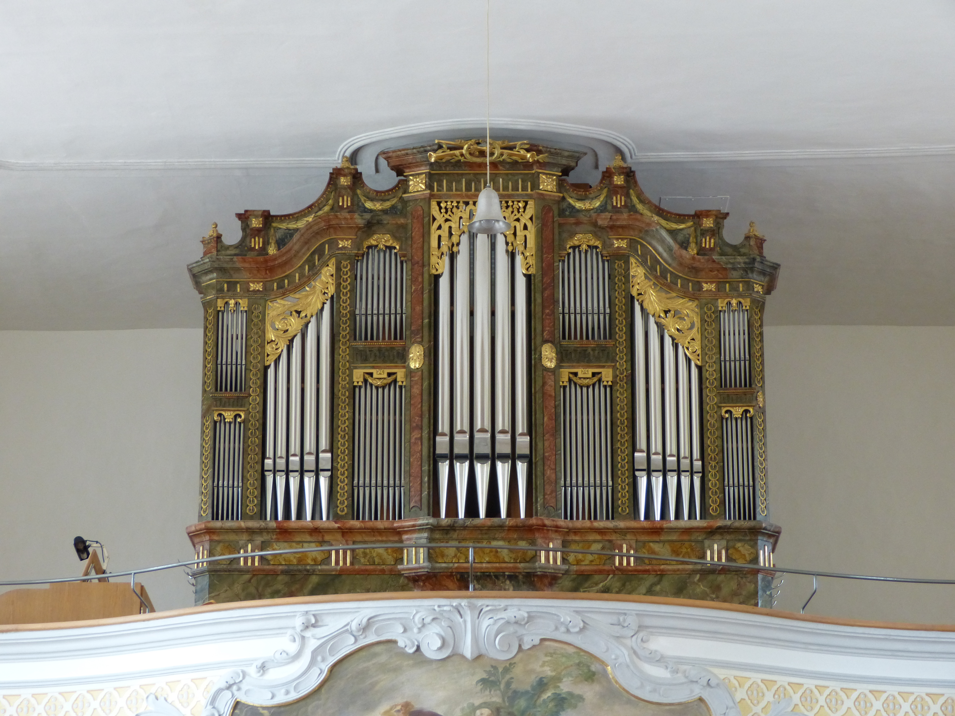 St. Afra Betzigau, Landkreis Oberallgäu, Bayern